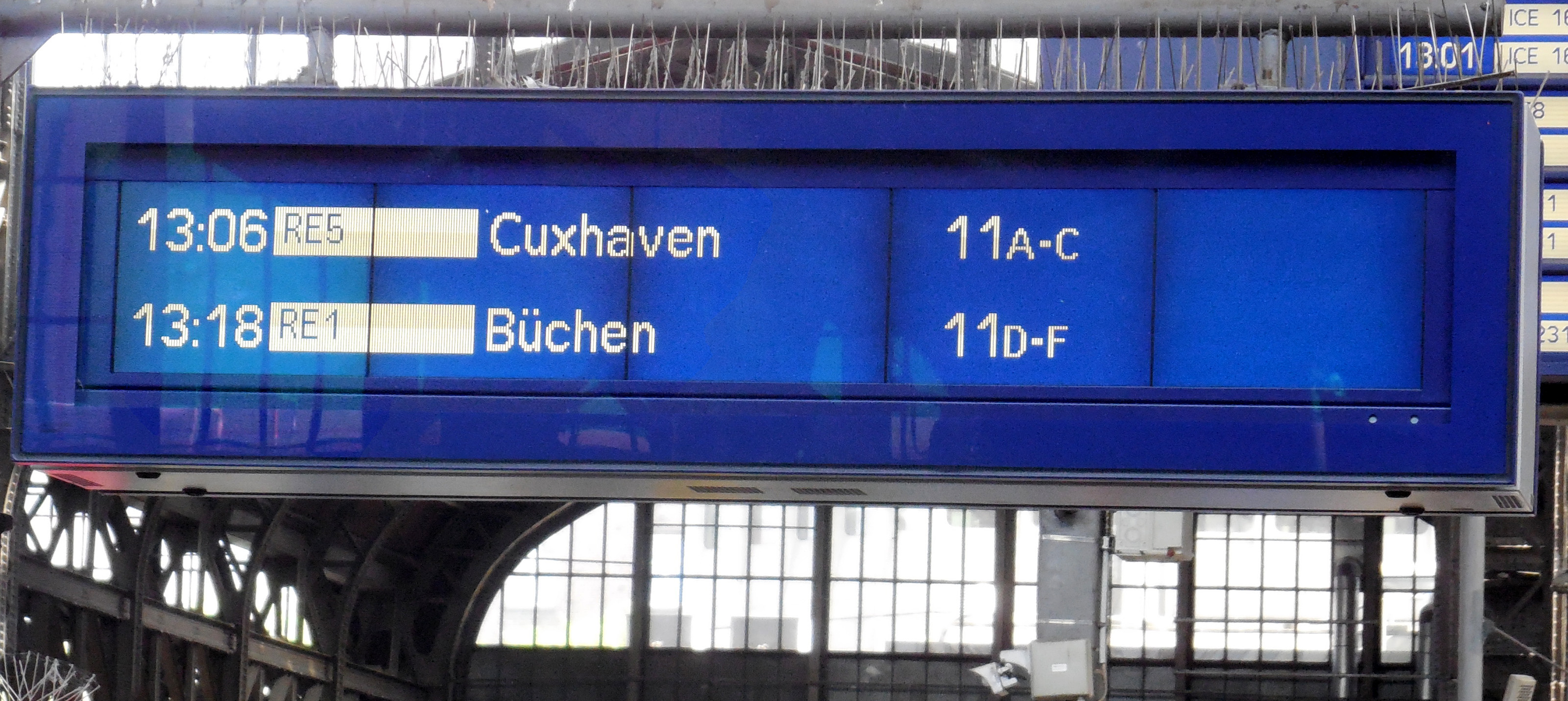 Zug-Anzeigetafel im Hamburger Hauptbahnhof